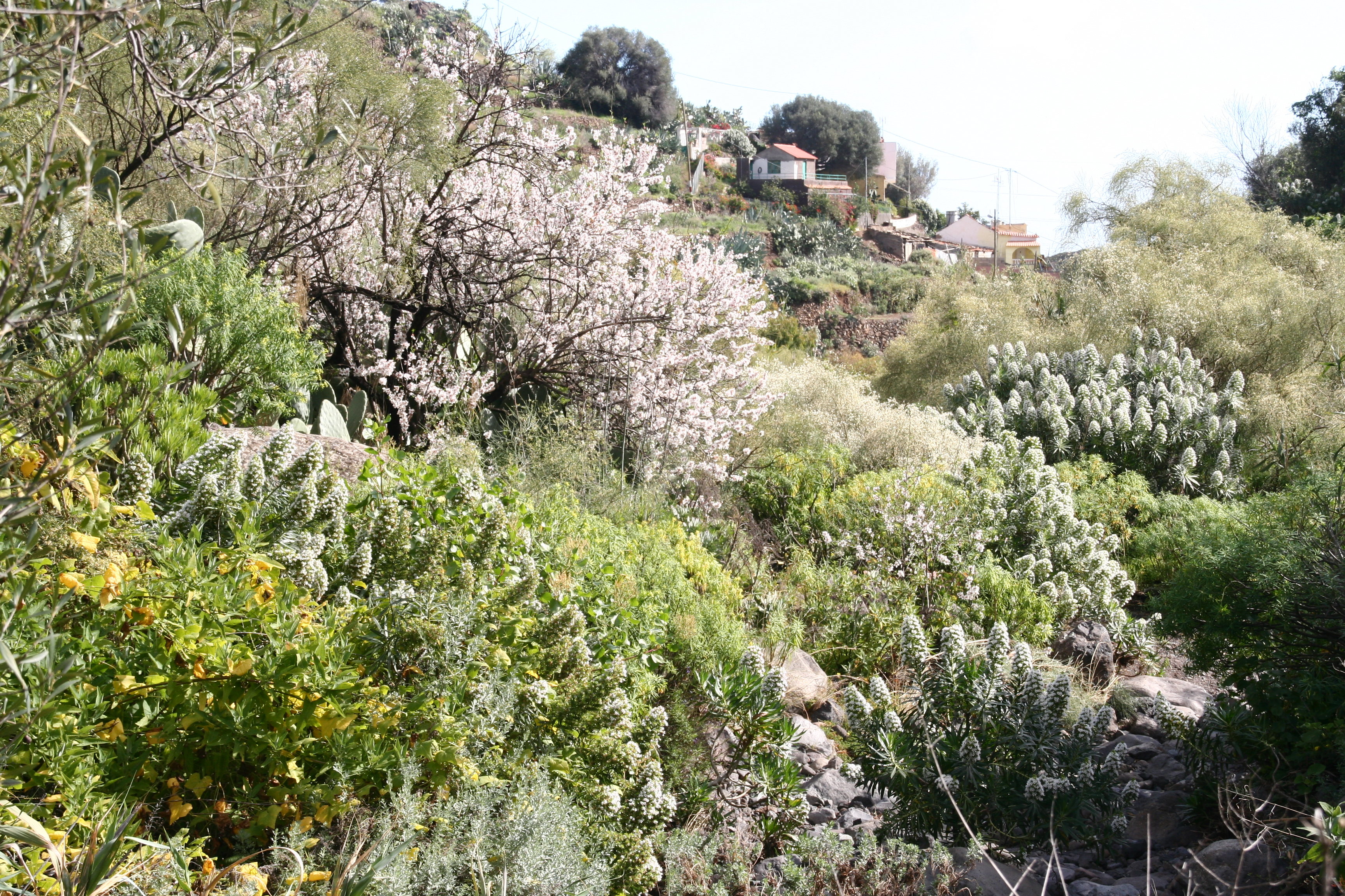 Telde, Gran Canaria, Canarias